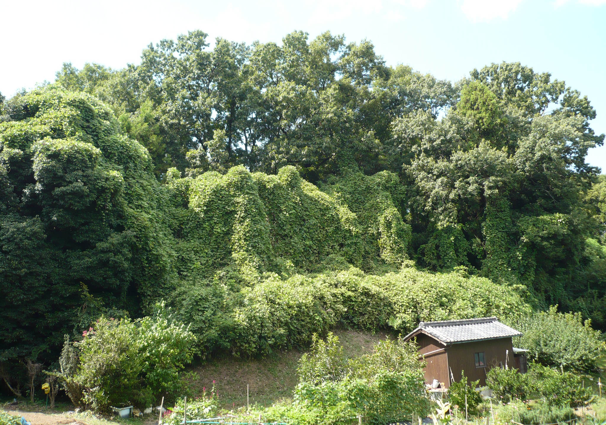 本丸跡